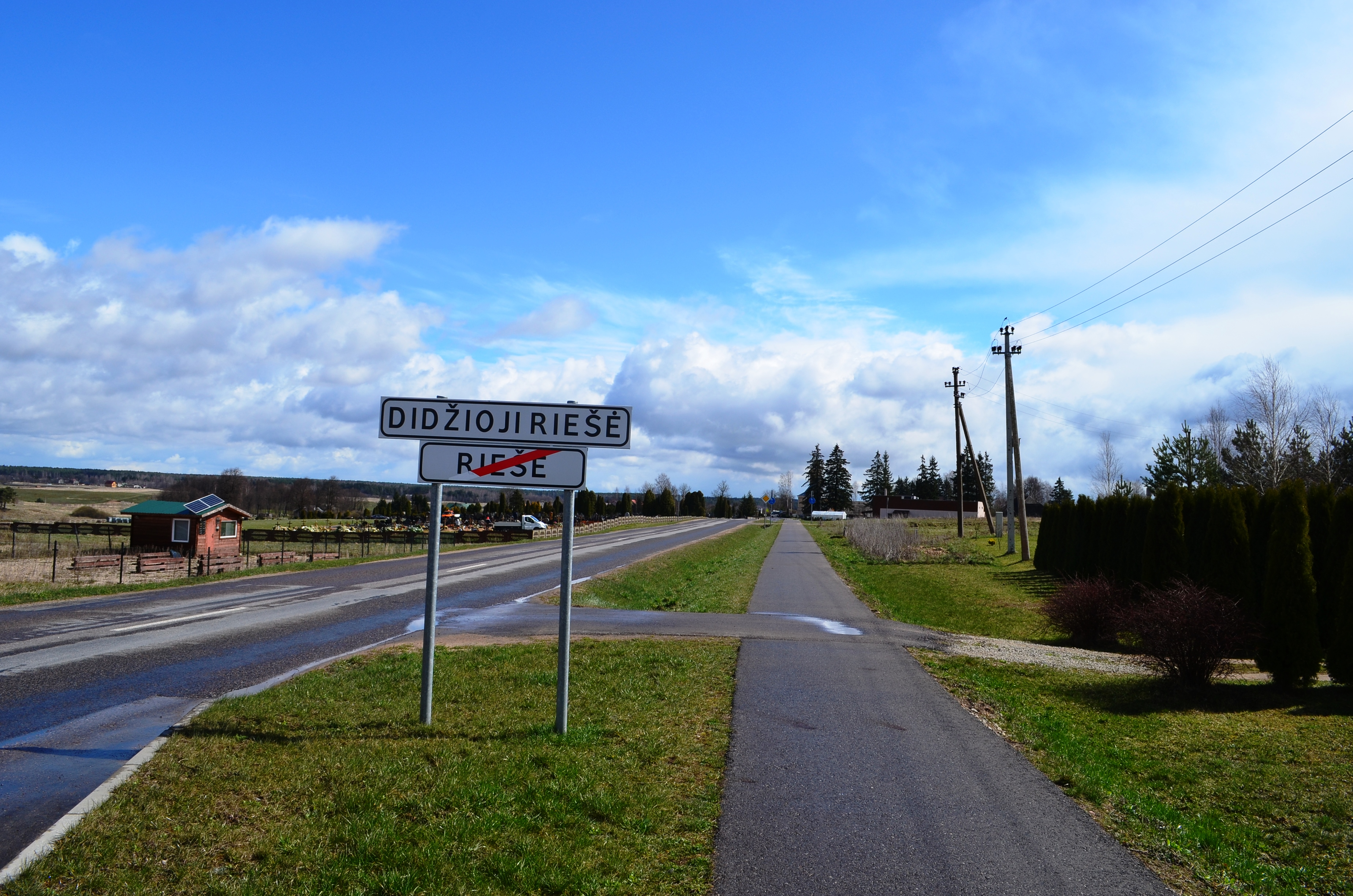 Didžioji Riešė, Vilniaus raj.